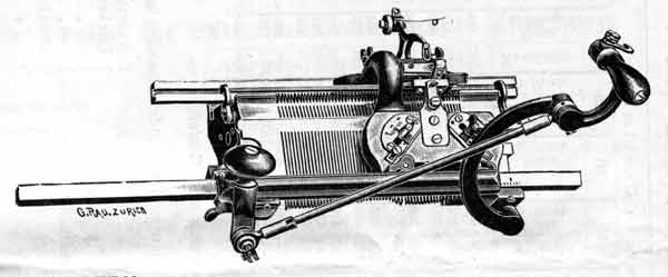 Handstrickmaschine Baujahr 1867